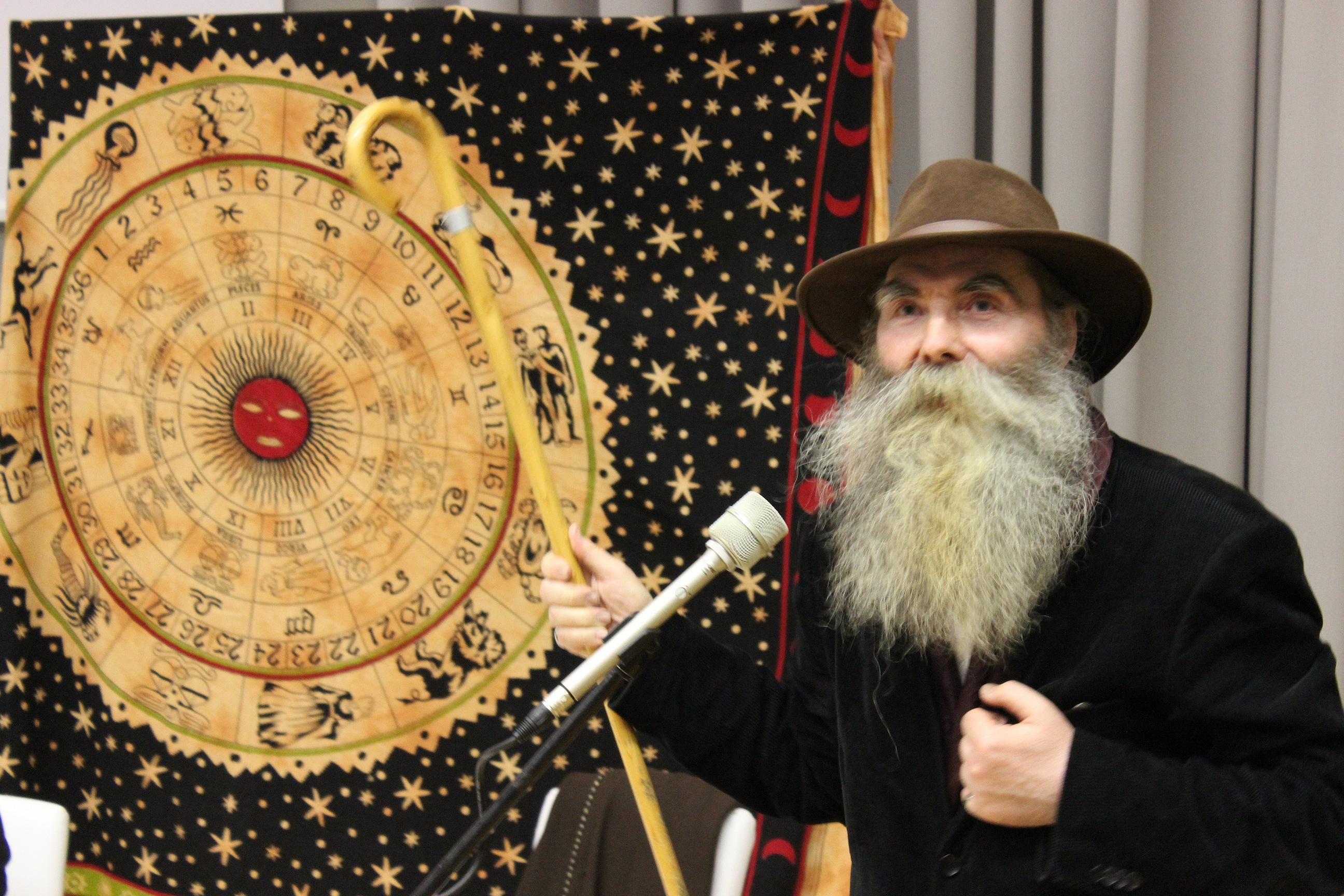 Igor Mang